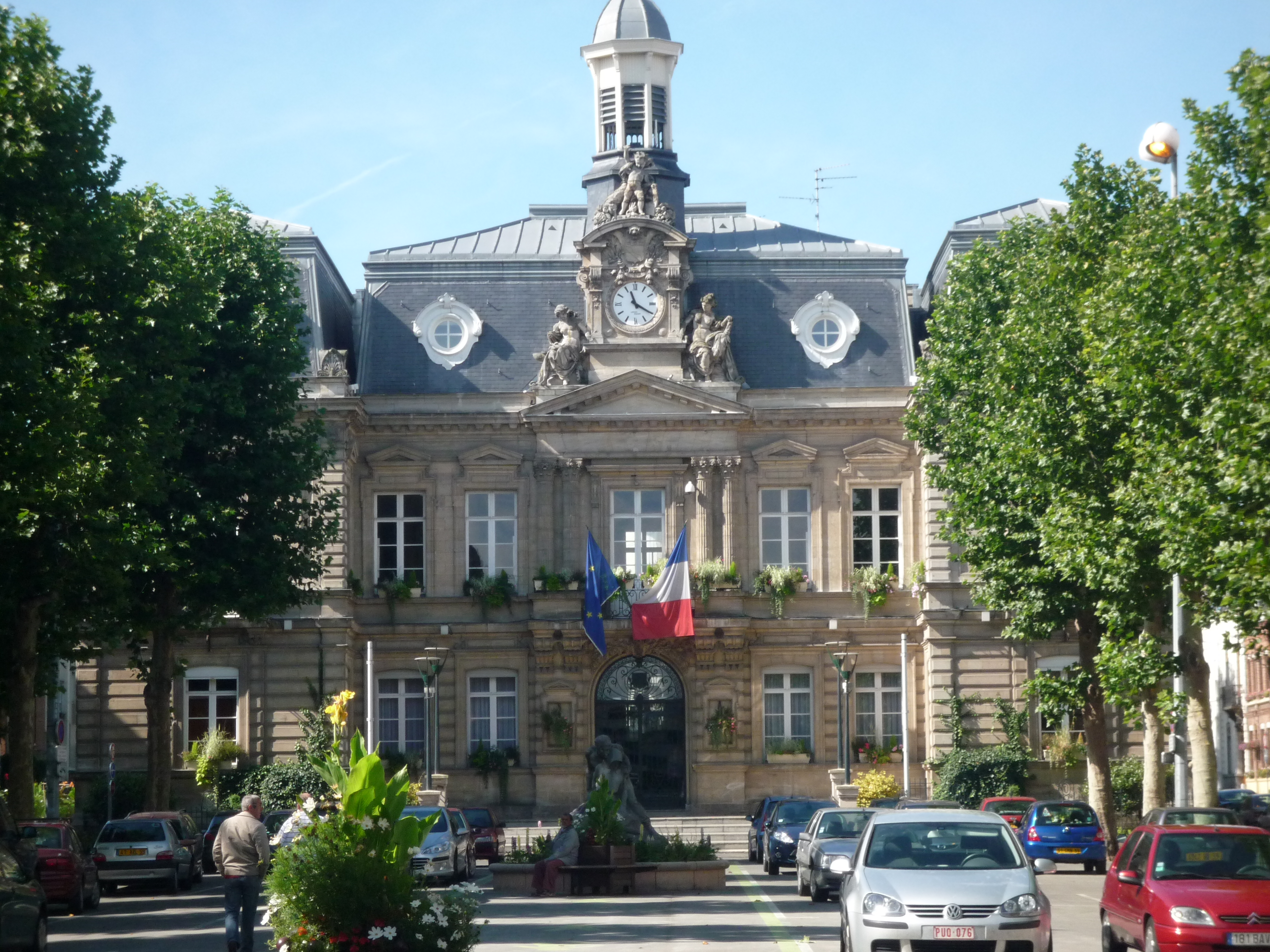 Mairie, Anzin, Nord, Nord-Pas-de-Calais, France.